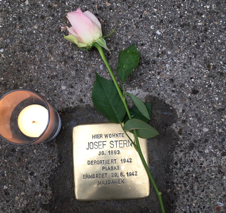 Stolperstein Neu-Ulm Josef Stern